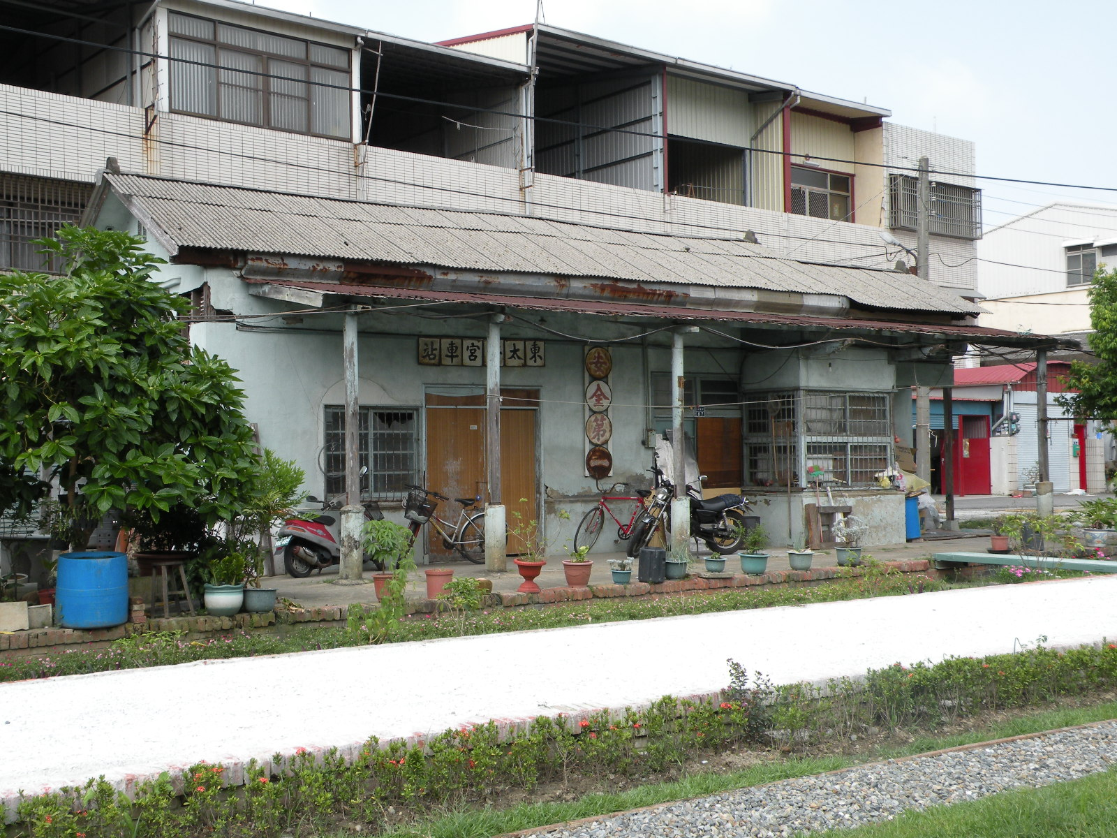 台湾台南県新営市にある台湾糖業東太子宮駅 Taisugar East Taizigong Station, Sinying, Tainan, Taiwan